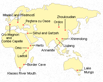 ჰომო საპიენსის გავრცელების არეალი